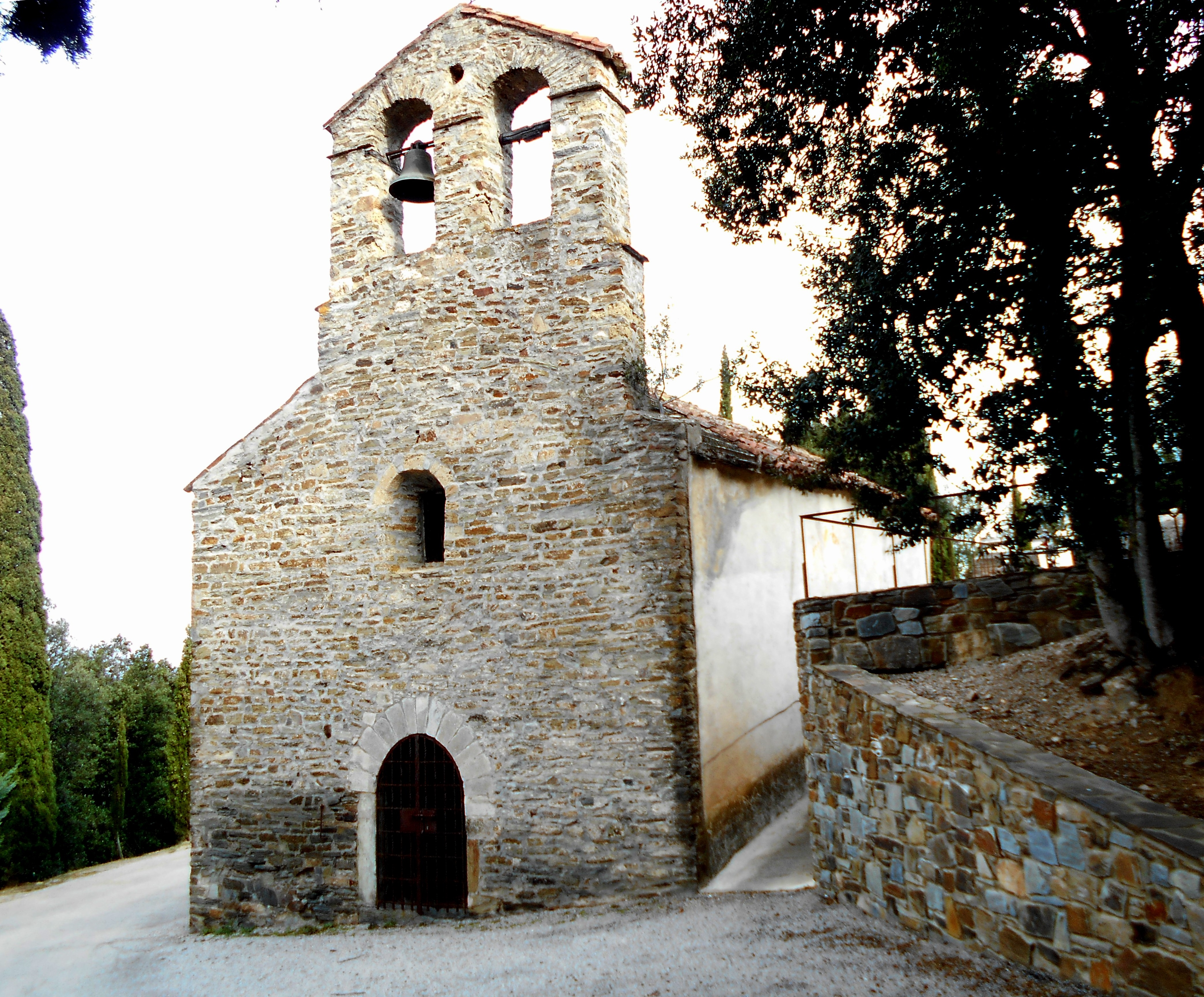 Façana occidental de Sant Sadurní de Montoriol d'Avall